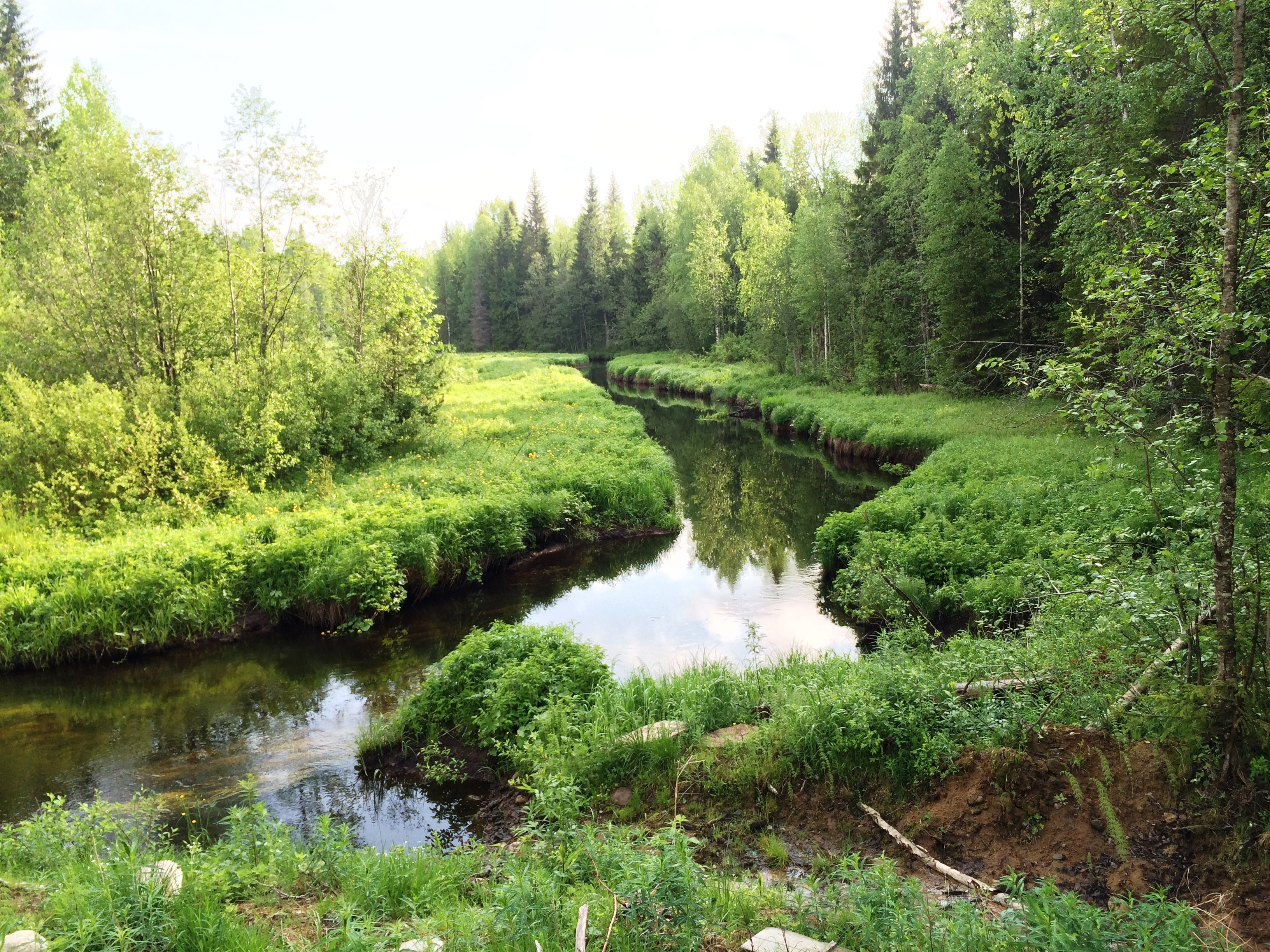 Кура (приток Видлицы)